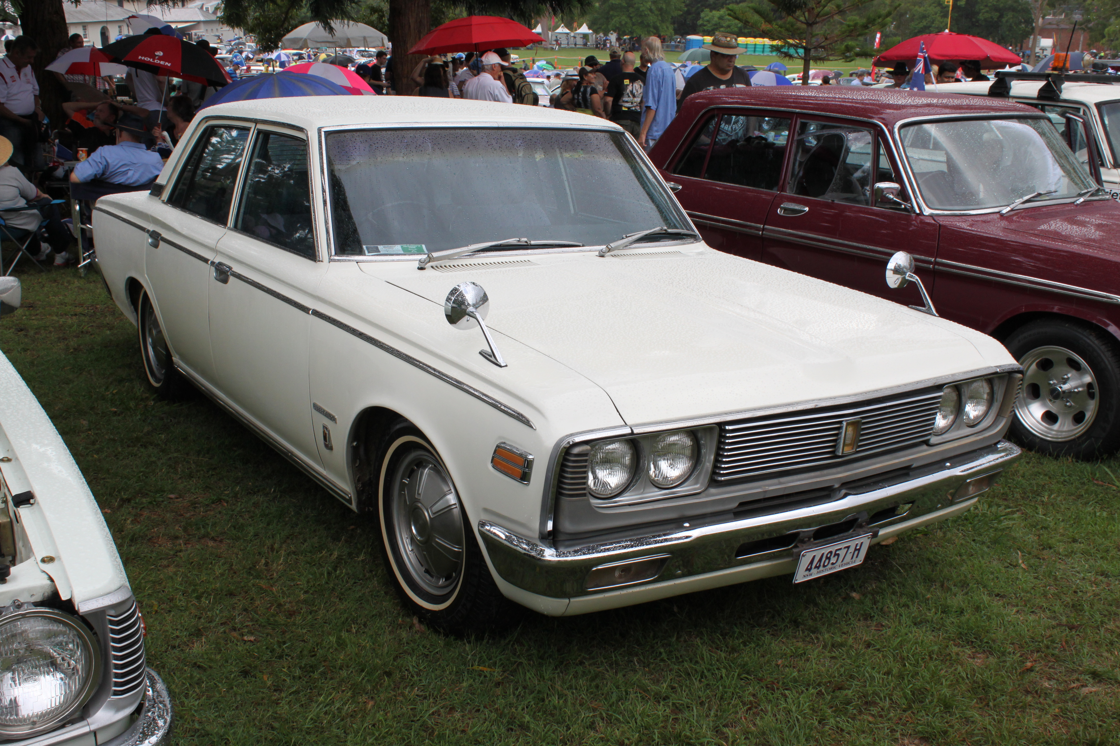 CARnivale, Parramatta Park, NSW Australia Day 2016